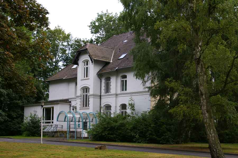 Galkhausen Haus 4